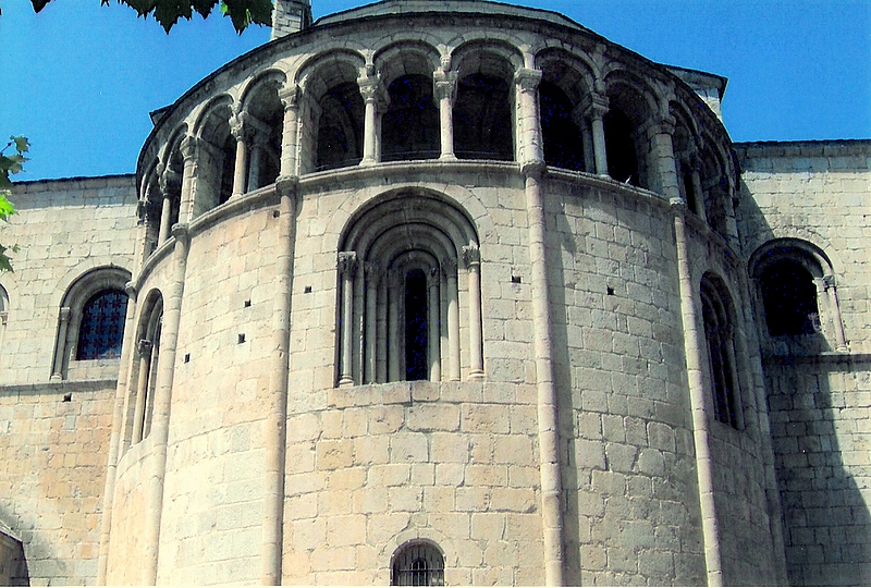 La Seu d´Urgell - Catedral . Absis central ornat amb la seva elegant galeria superior